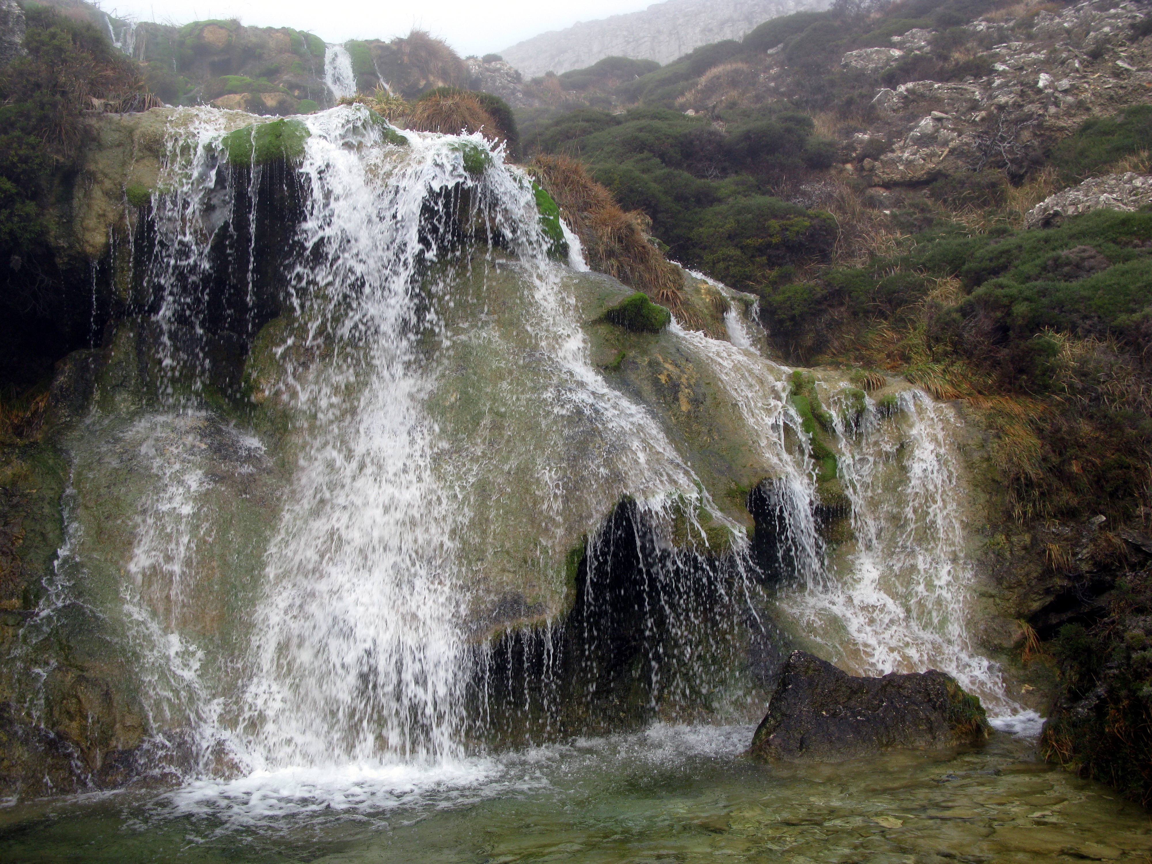 Cascada de toba en el necimiento del Arroyo Mundilla, Cueva de Villaescobedo